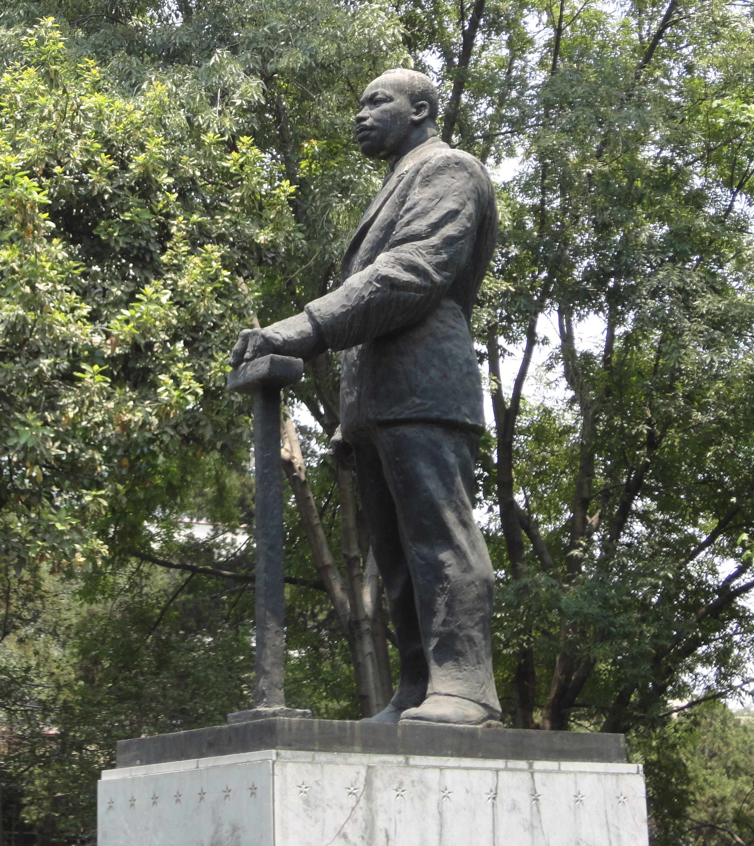 Estatua del Dr. Martin Luther King en el parque abraham linconl en el área de polanco en el distrito federal en México